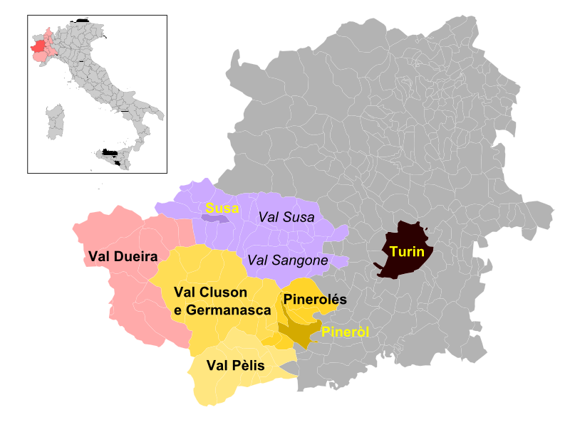 La ciutat metropolitana de Turin e las comunas occitanas en roge e irange